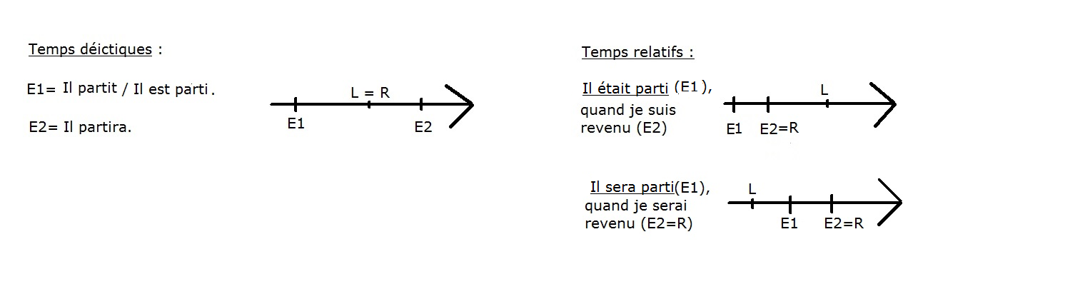 Représentation sur l'axe du temps des temps grammaticaux simplees et composés en français.